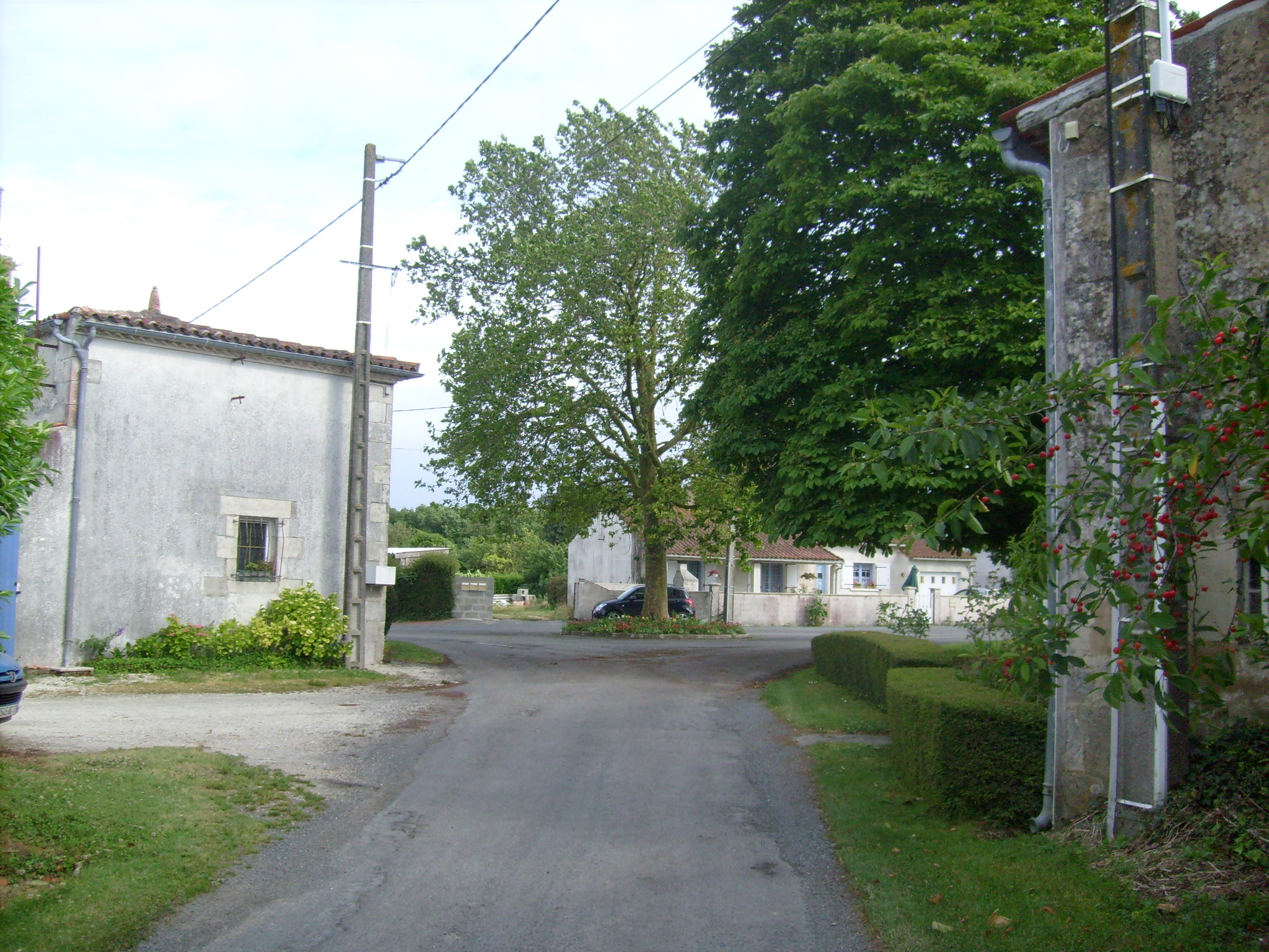 Le hameau de Brie à Médis (Charente-Maritime)